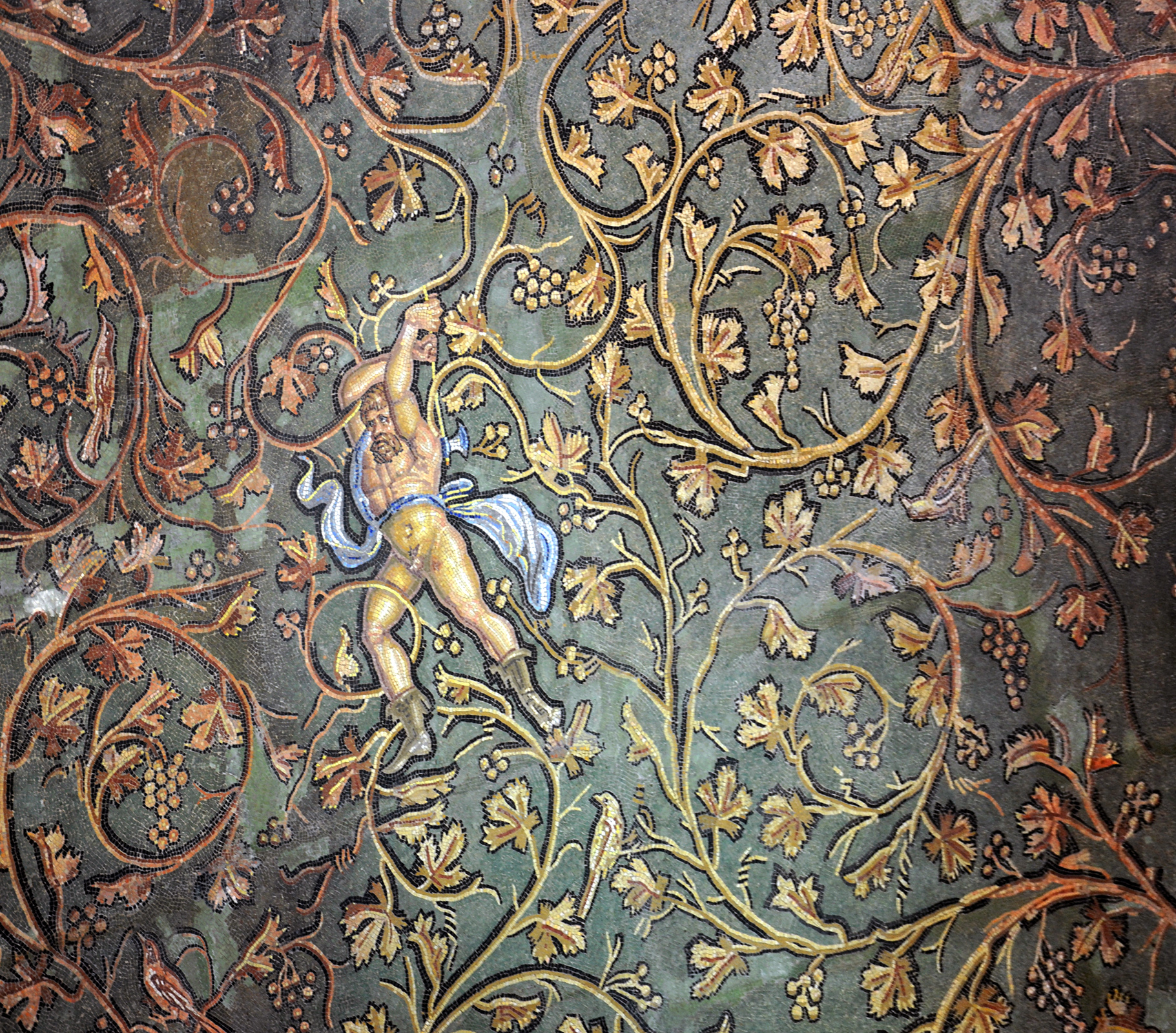 Le châtiment de Lycurgue (détail), grande mosaïque qui ornait une salle de réception, 2ème moitié du 2ème siècle, pierres et pâtes de verre bleues, découverte à Sainte-Colombe. Musée de Saint-Romain-en-Gal-Vienne.